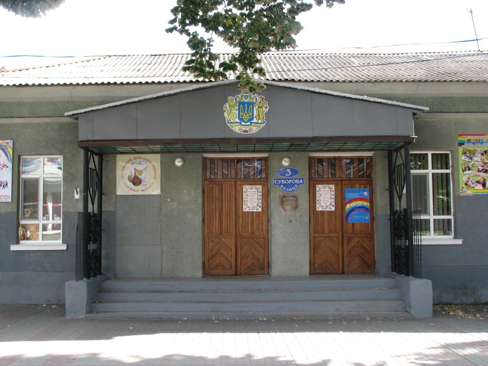 Брама клубу "Трудові резерви" (мур.), Херсон, Суворова вул., 3